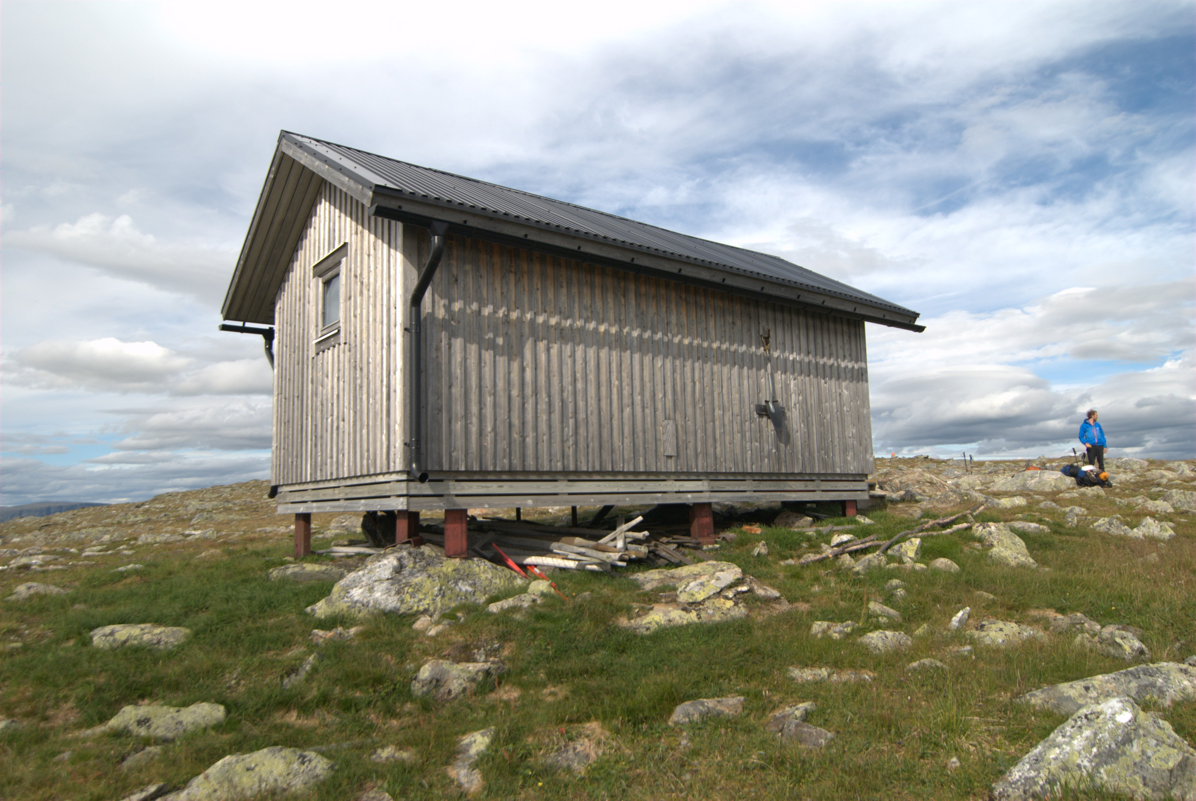 Shelter of Juovatvaratje, in Kungsleden trail, Vindelfjällen